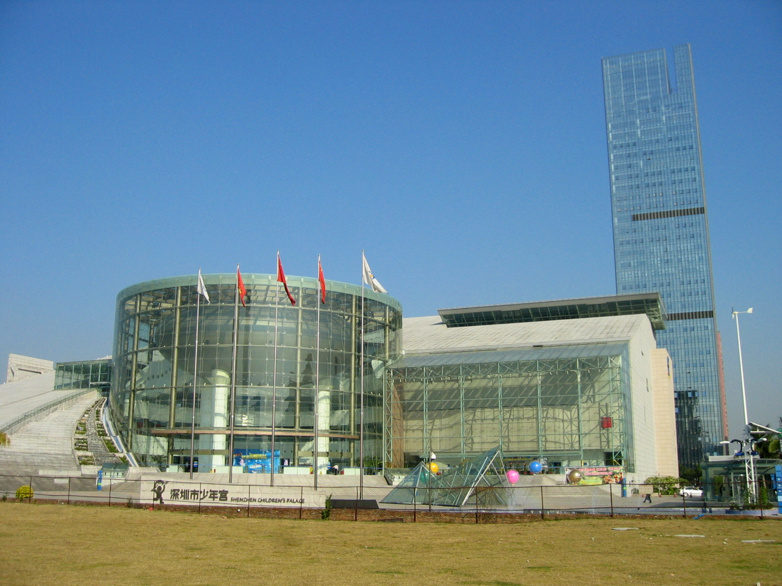 Shenzhen Children Palace 深圳少年宮